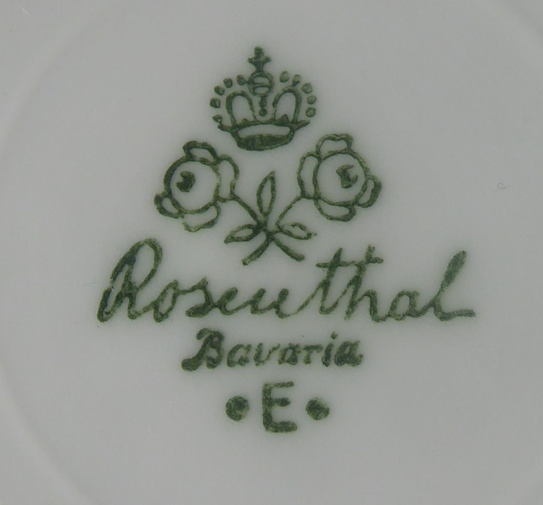 Rosenthal Porzellan Bodenmarke - Perlrand "Grüner Kranz"